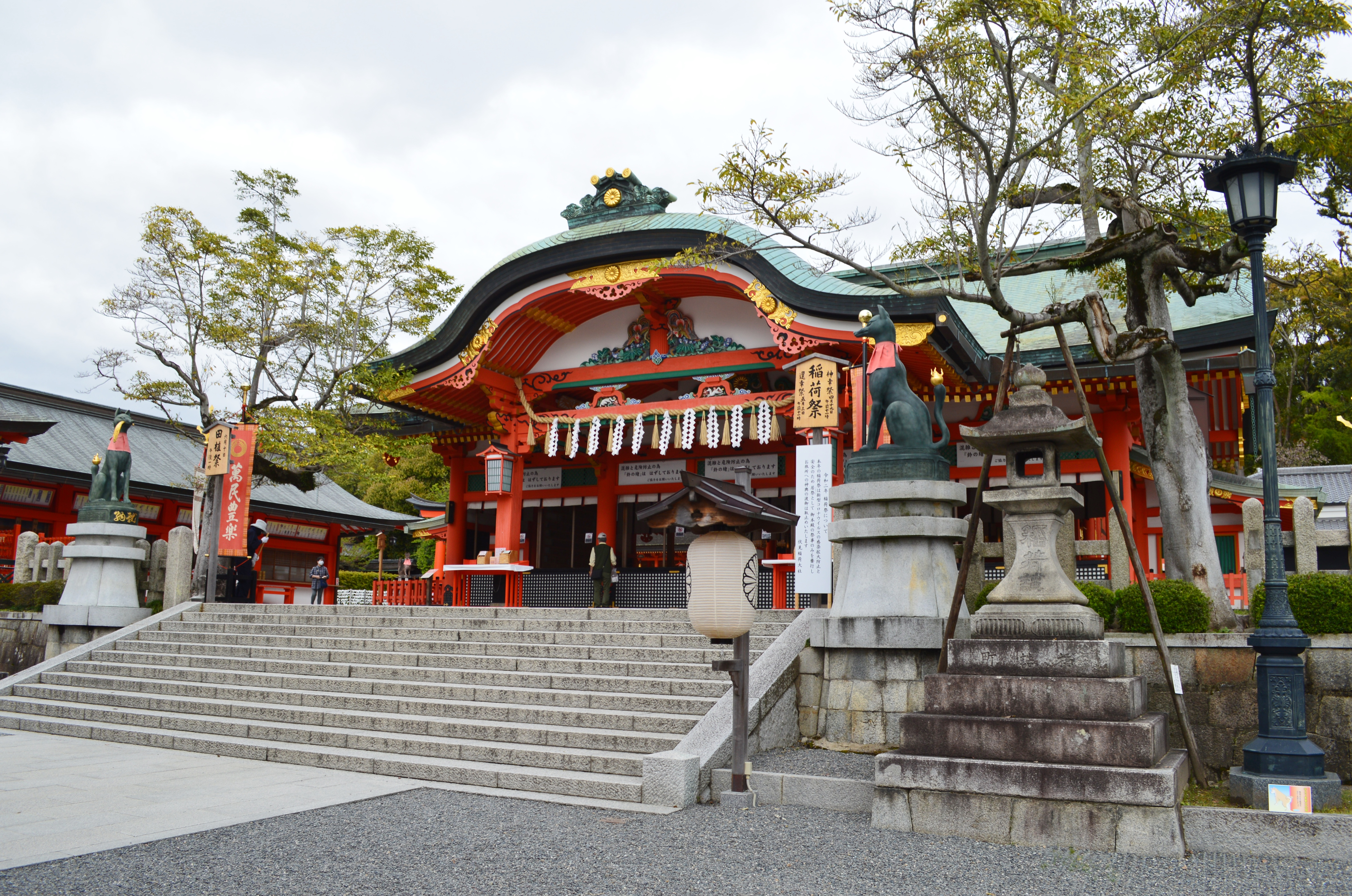 伏見稲荷大社 内拝殿 Nikon D3200